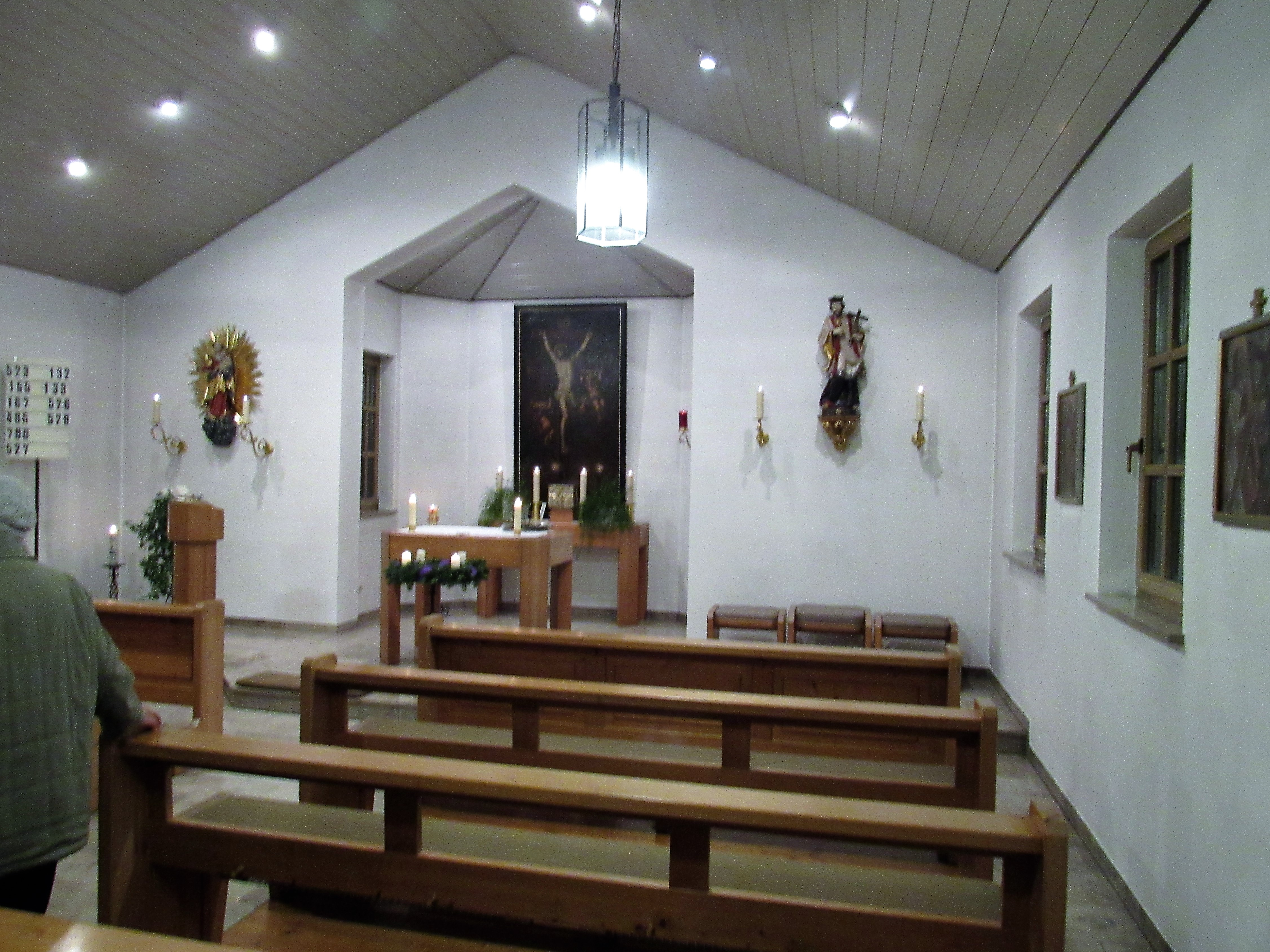 Kath. Kirche Volkershausen innen